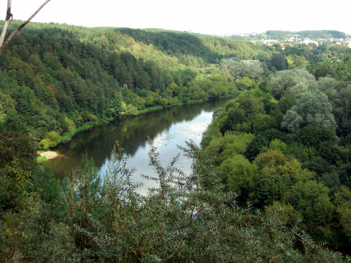 Vaizdas nuo Plikakalnio atodangos viršaus